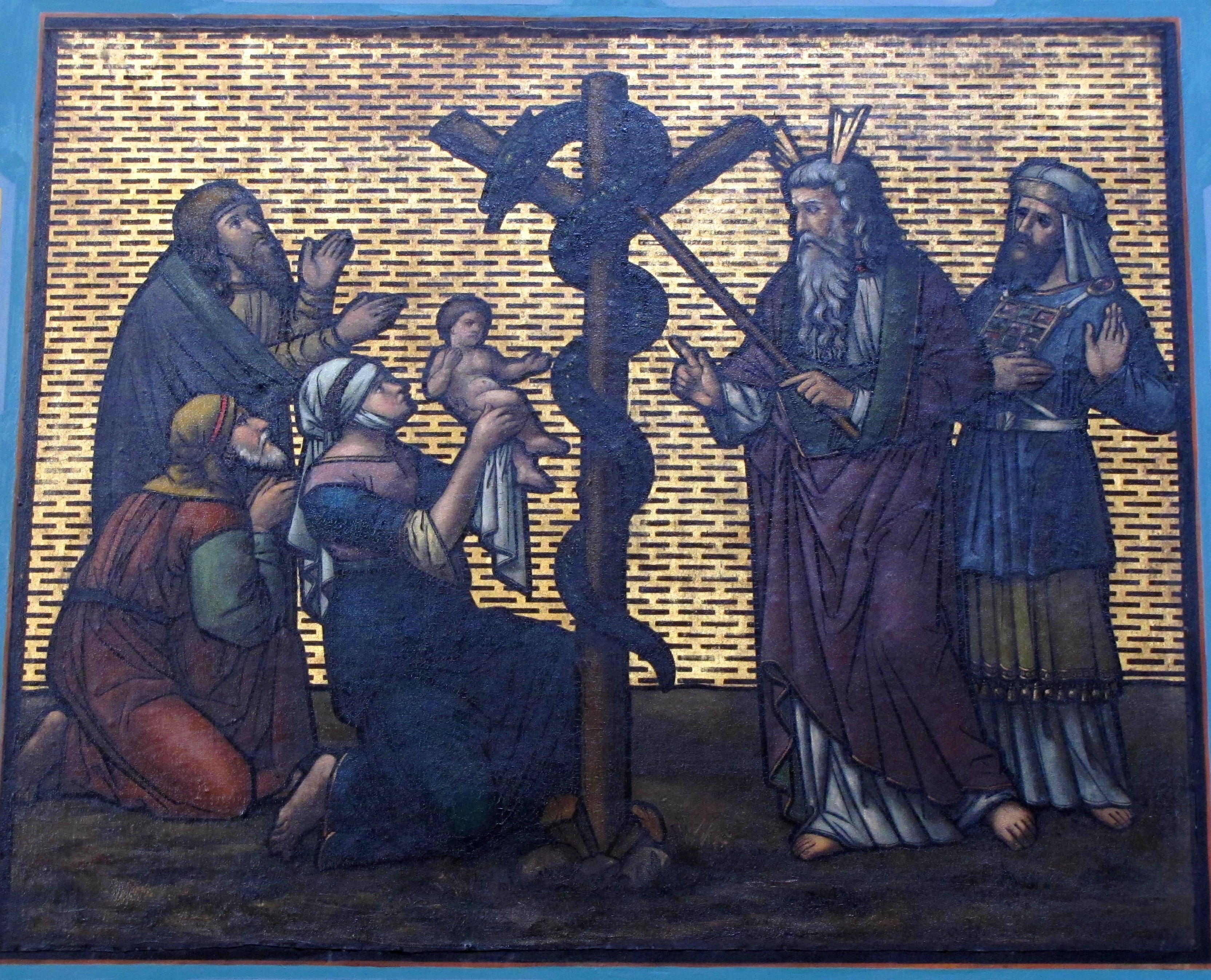 Alsace, Bas-Rhin, Église Saint-Étienne de Mackenheim (IA67010704). Peinture monumentale "Moïse et le serpent d'airain" (Jean Weyh, 1886)